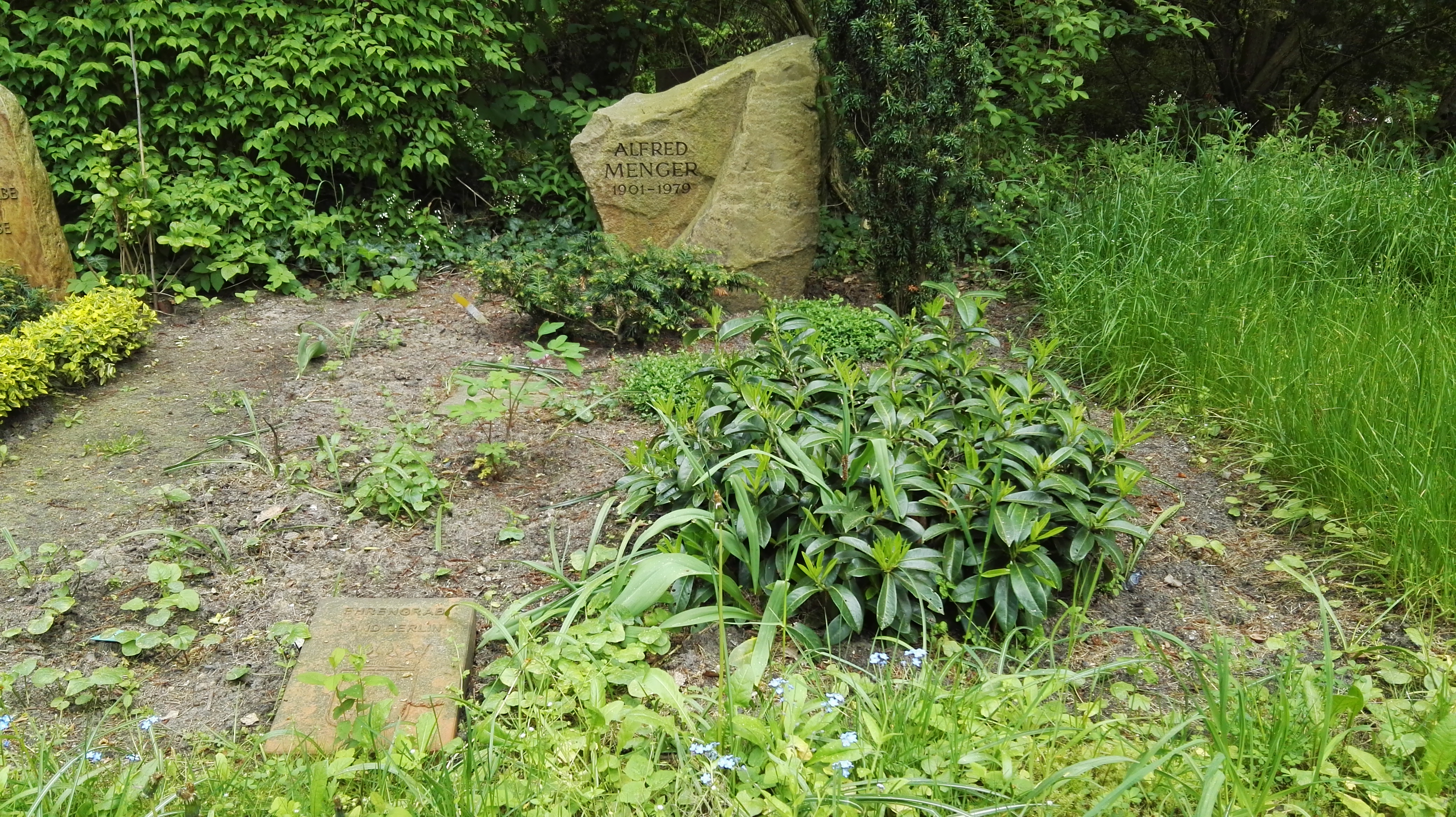 Grab von Alfred Menger auf dem Heidefriedhof in Berlin; Ehrengrab